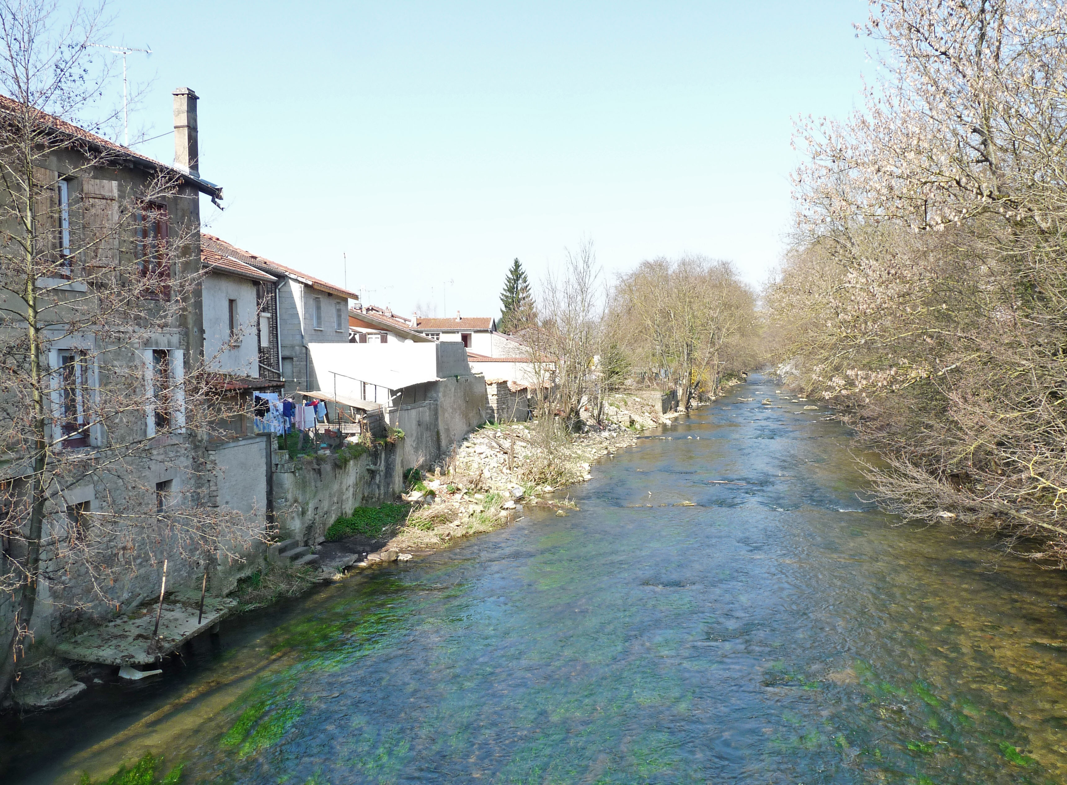 La Blaise (affluent de la Marne) à Wassy (Haute-Marne).